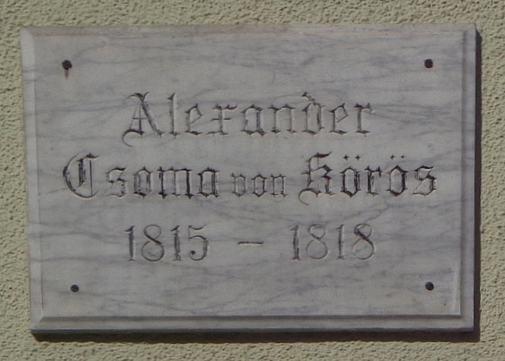 Göttinger Gedenktafel für Alexander Csoma von Körös/Sándor Csoma de Körös/Kőrösi Csoma Sándor, ungarischer Sprachforscher (Weender Straße 31)